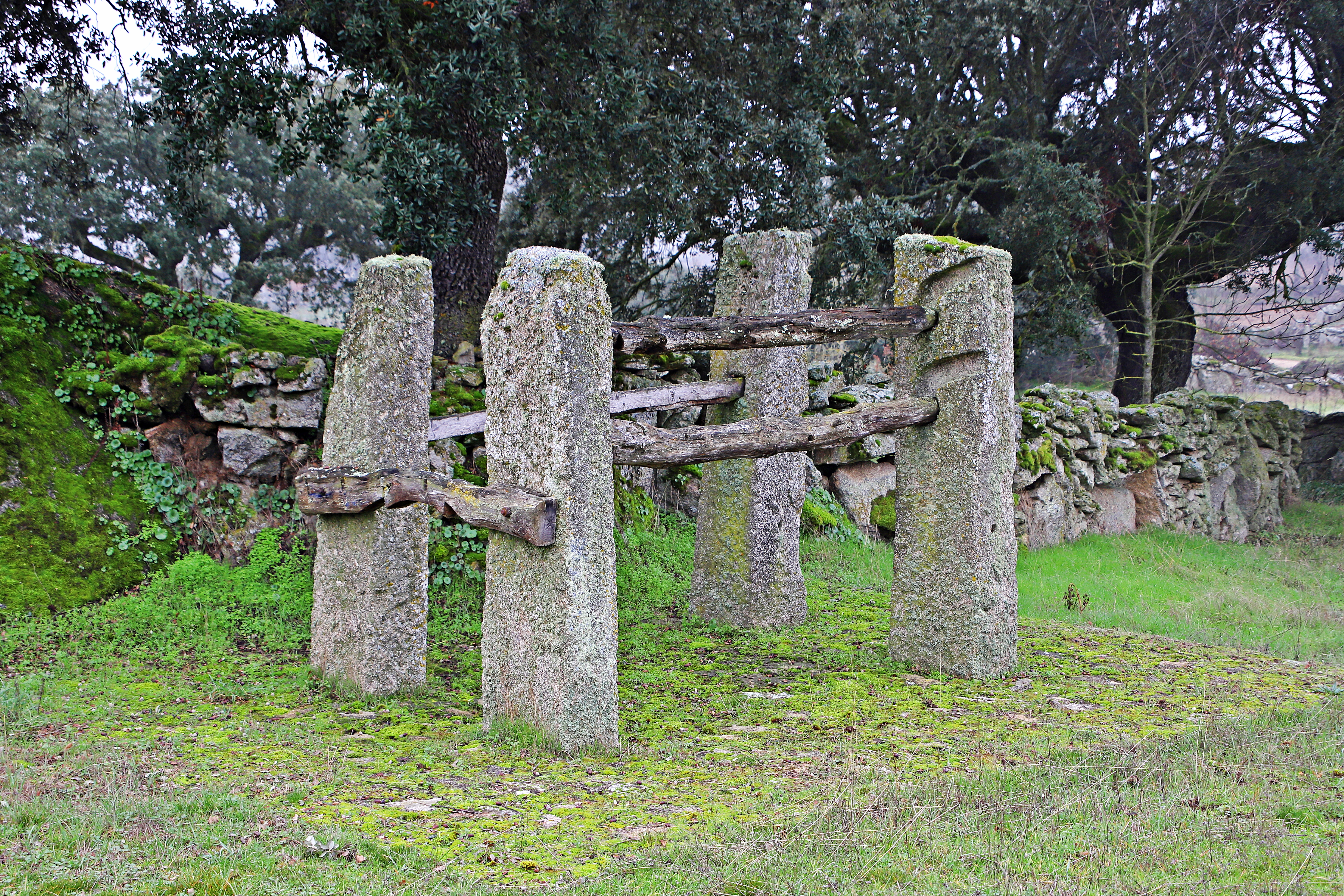 Moralina, municipio de la comarca de Sayago, en la provincia de Zamora